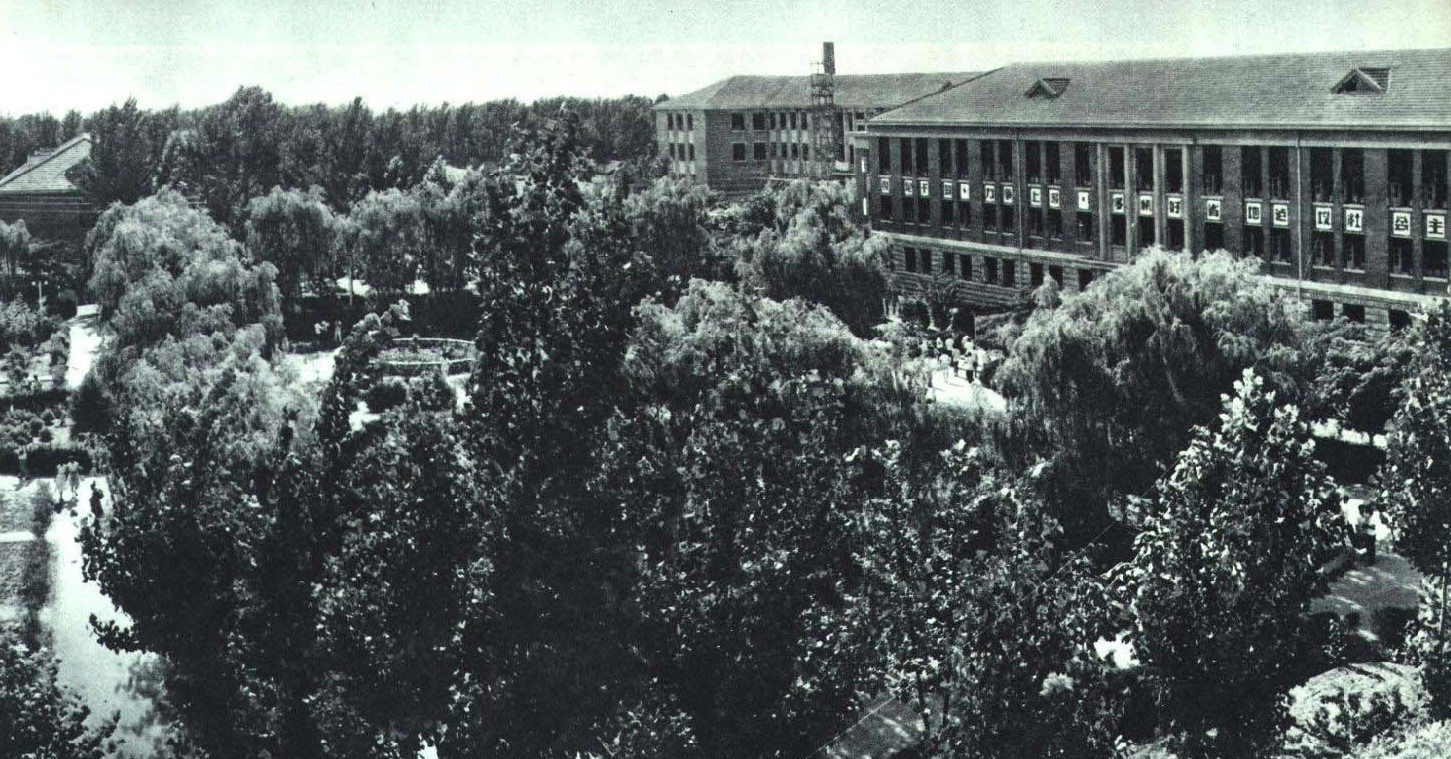 1964-01 1964年 曲阜师范学院